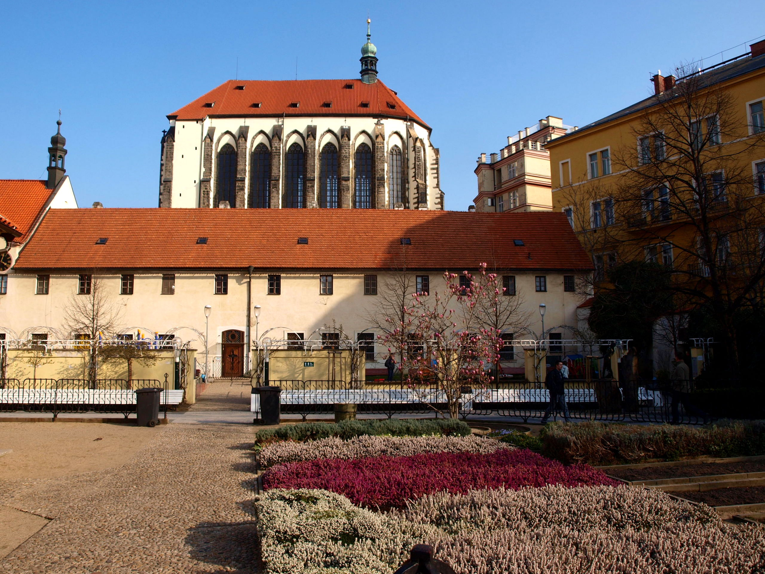 Praha, kostel Panny Marie Sněžné